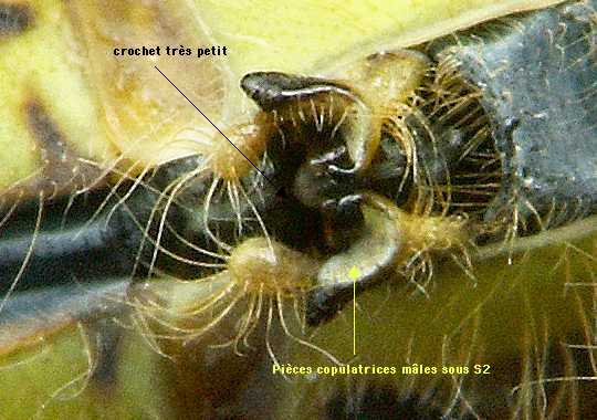 Appareil génital et pièces copulatrices ouverte de mâle (Sympetrum fonscolombii)